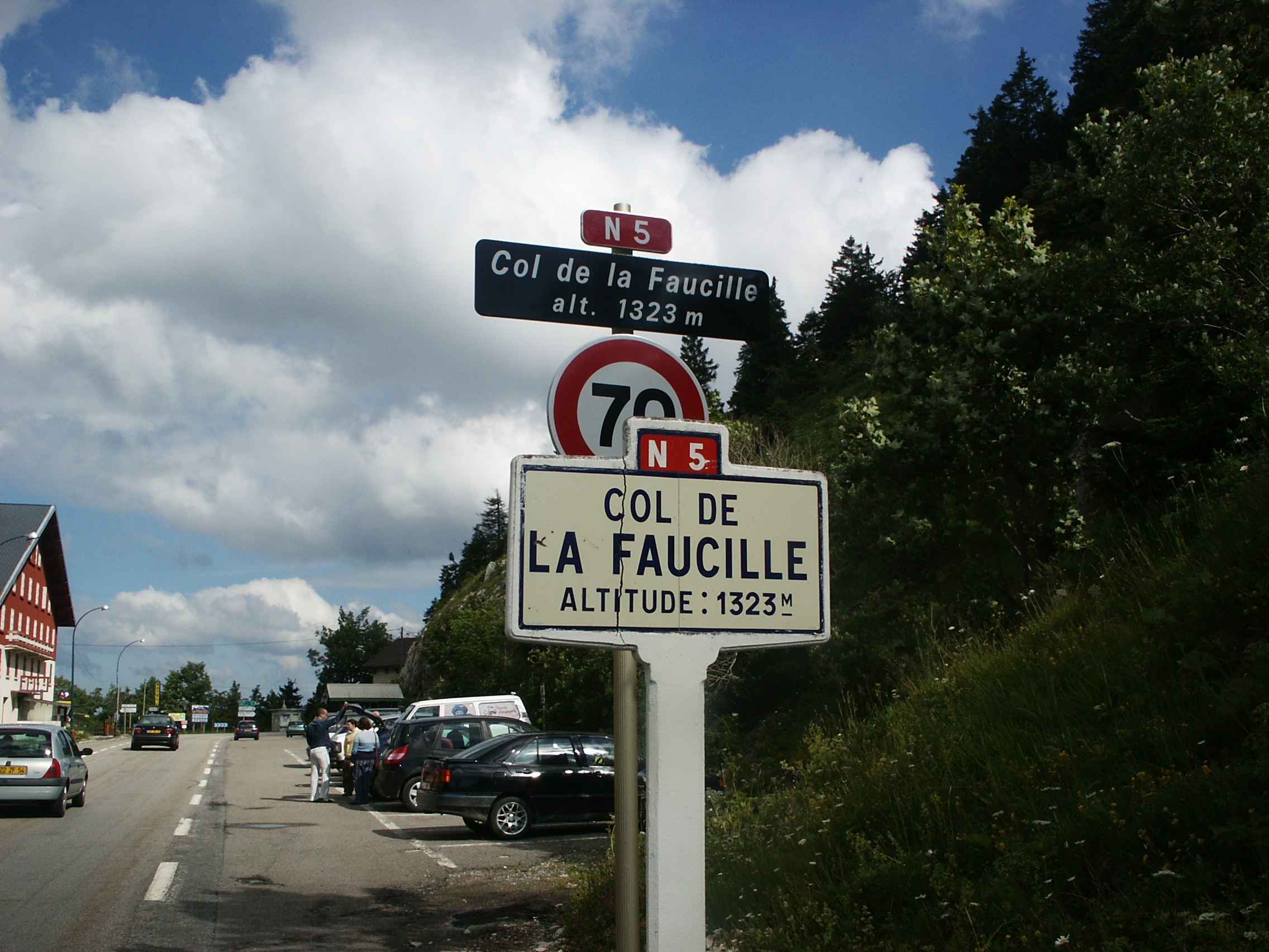 Col de La Faucille (Ain)